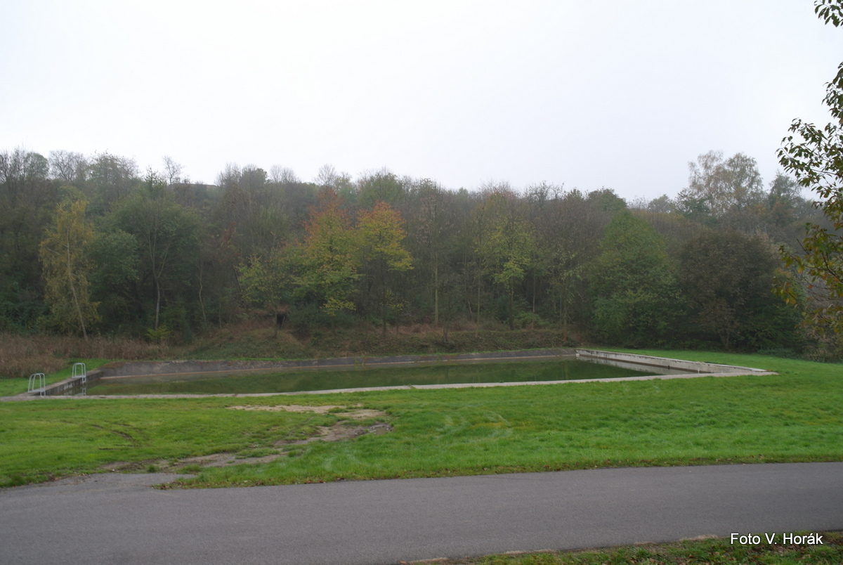 Vodní nádrž u Pohořic (Martiněves).